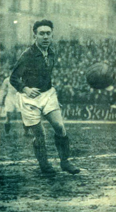 Braine Raymond, CS weekly magazine Star 1.03.1934